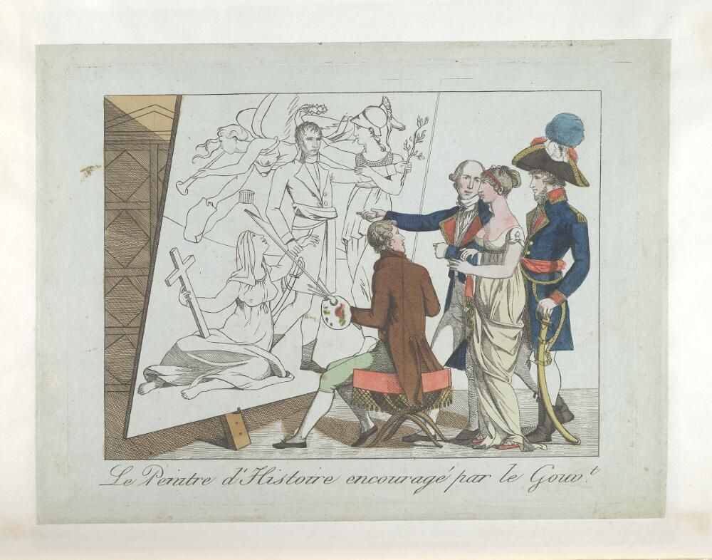 French political cartoon